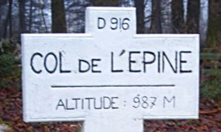 Panneau se trouvant au col de l'épine